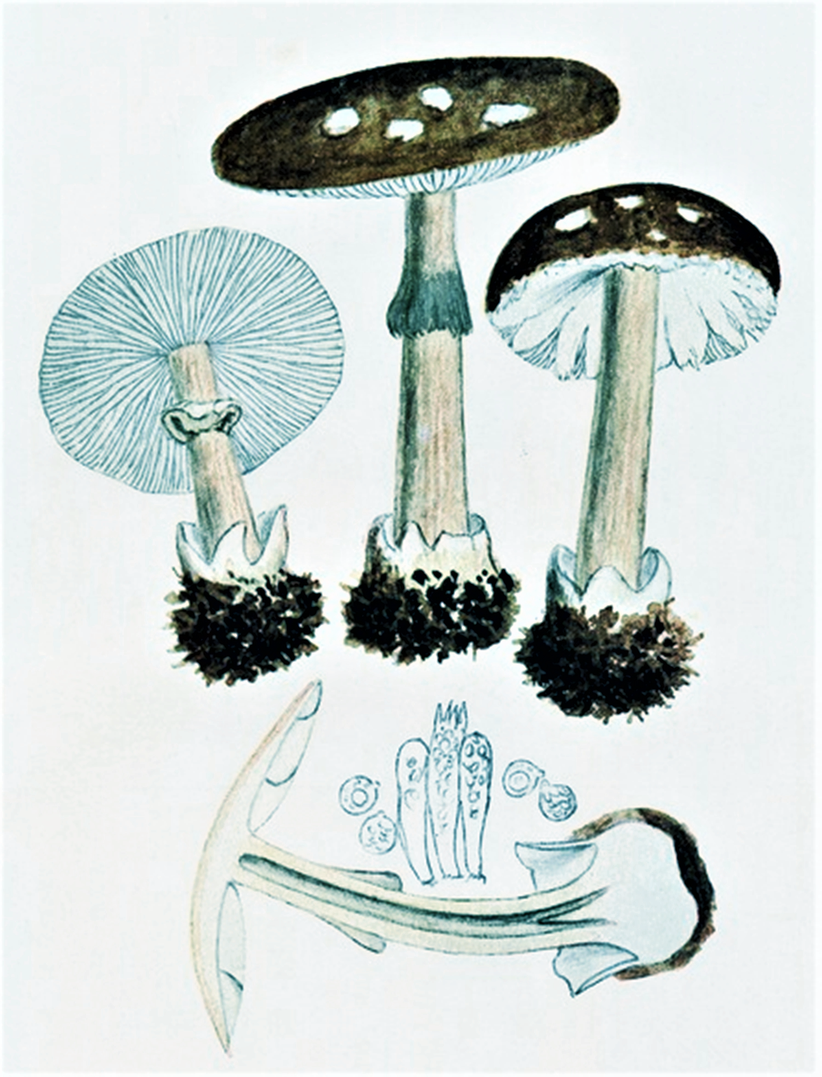 Giacomo Bresadola: Amanita porphyria